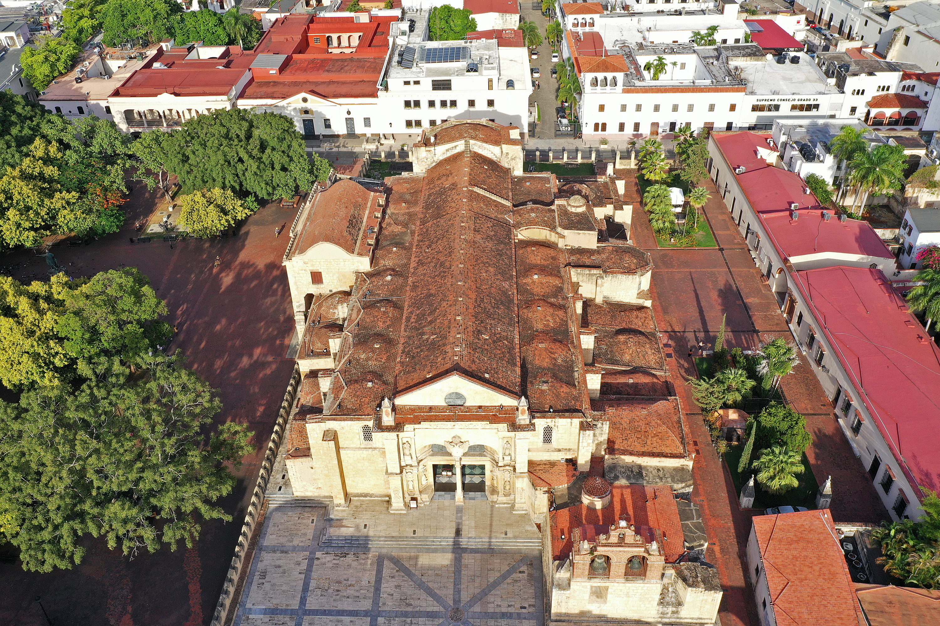 Vista aérea de la Catedral Primada de América, Ciudad Colonial Santo Domingo